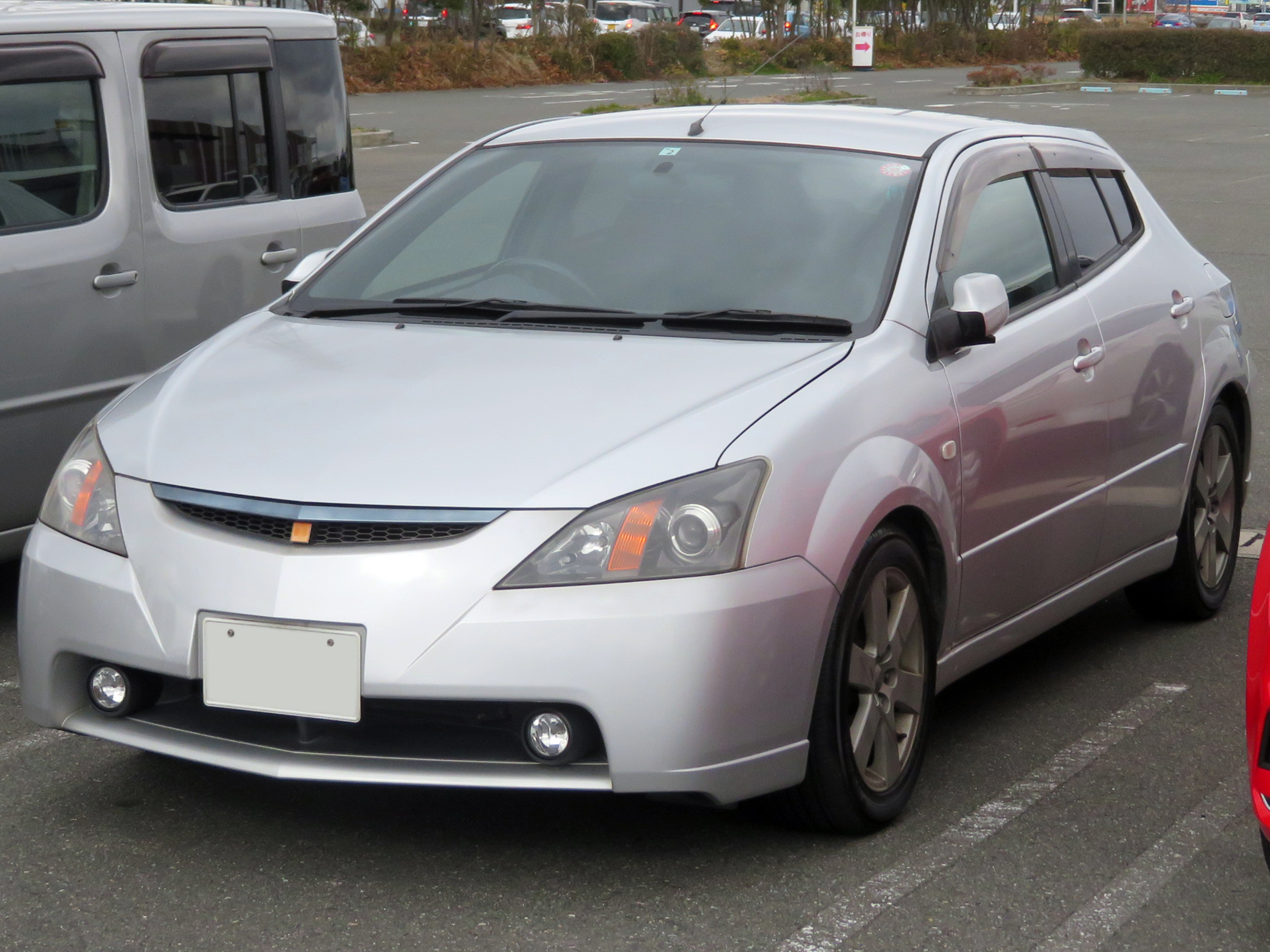 TA-ZZE128型トヨタ・WiLL VS 1.8VVTL-i 2WDをフロントから撮影。